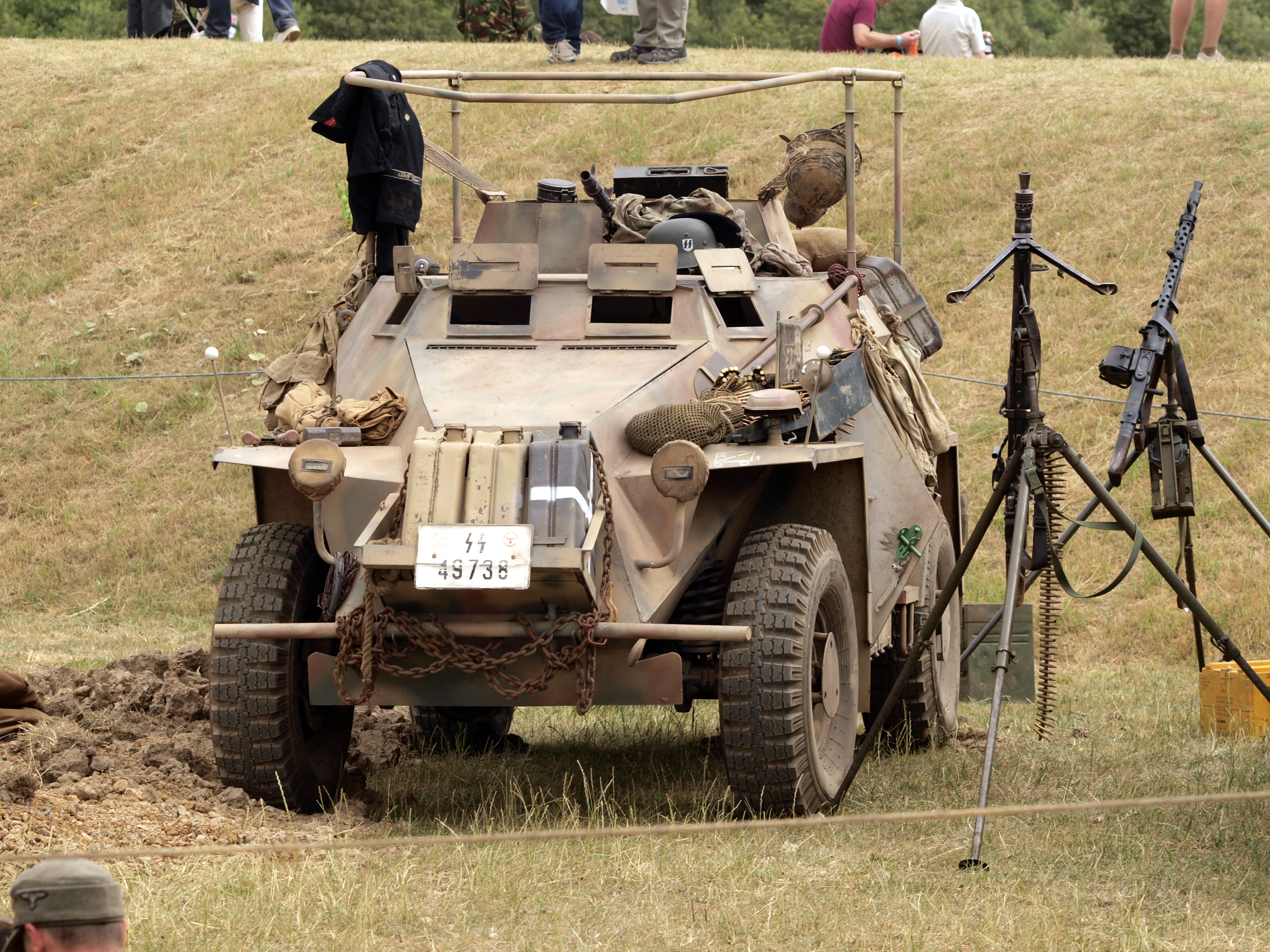 SdKfz. 223 Panzerfunkwagen SS 49738